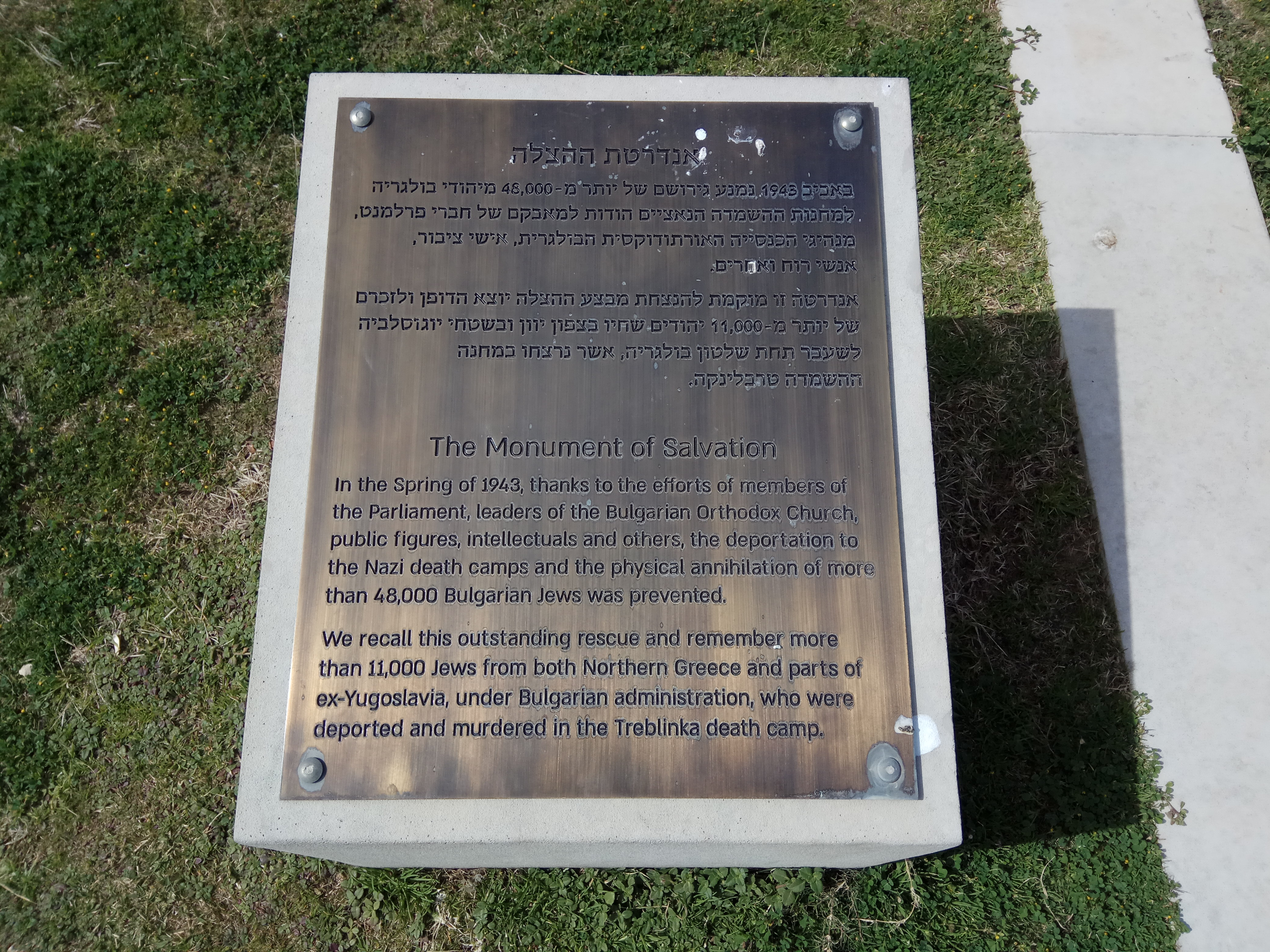 אנדרטת ההצלה בתל אביב